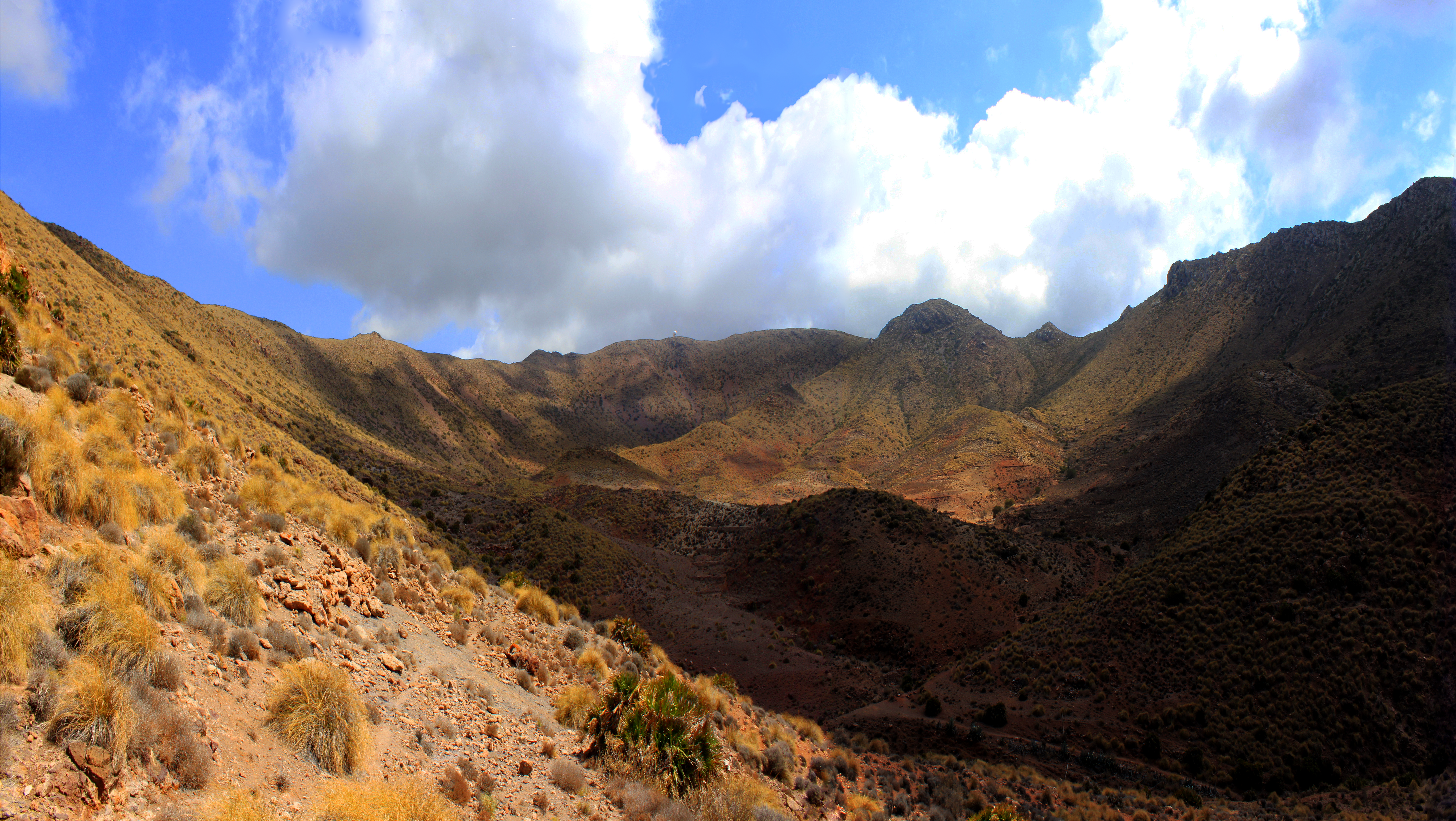 Caldera de la Majada Redonda desde el interior. Este antiguo volcán se encuentra situado en el Parque natural del Cabo de Gata. Níjar, provincia de Almería, Andalucía, España.